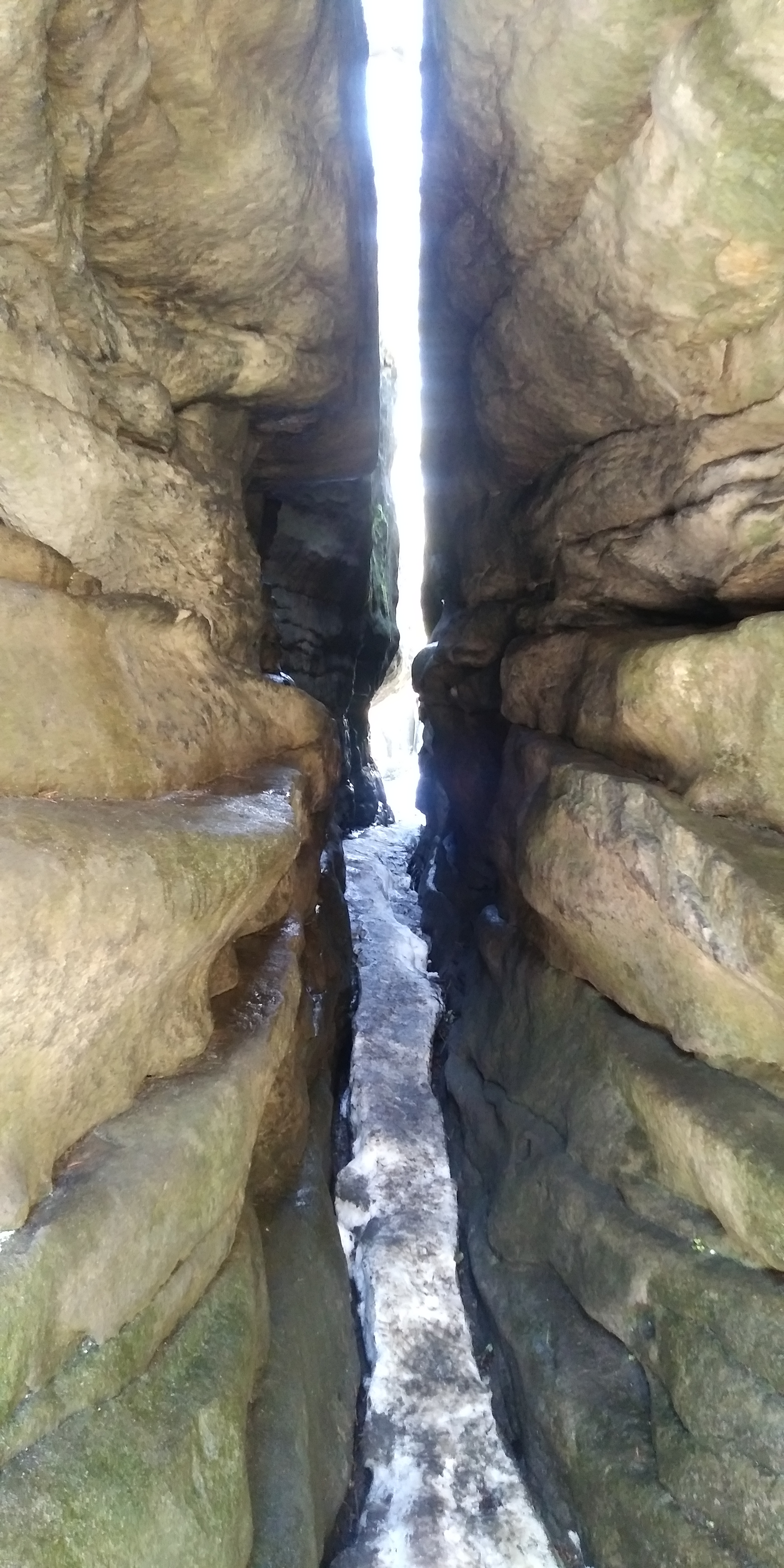 Przejście po Błędnych Skałach w okresie zimowym w marcu.